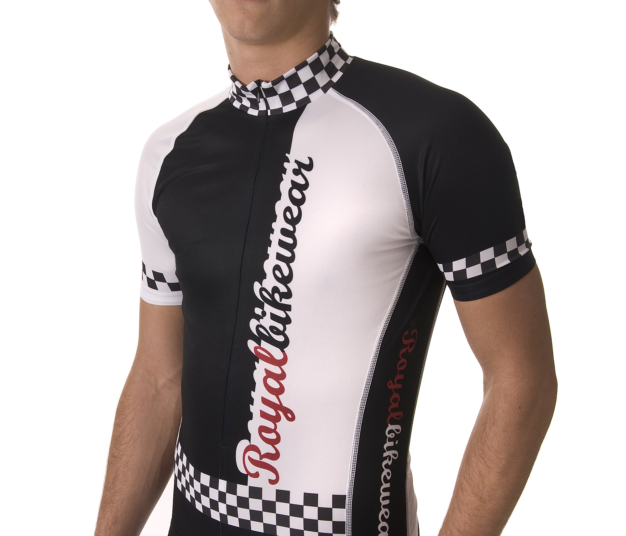 Fahrradtrikot